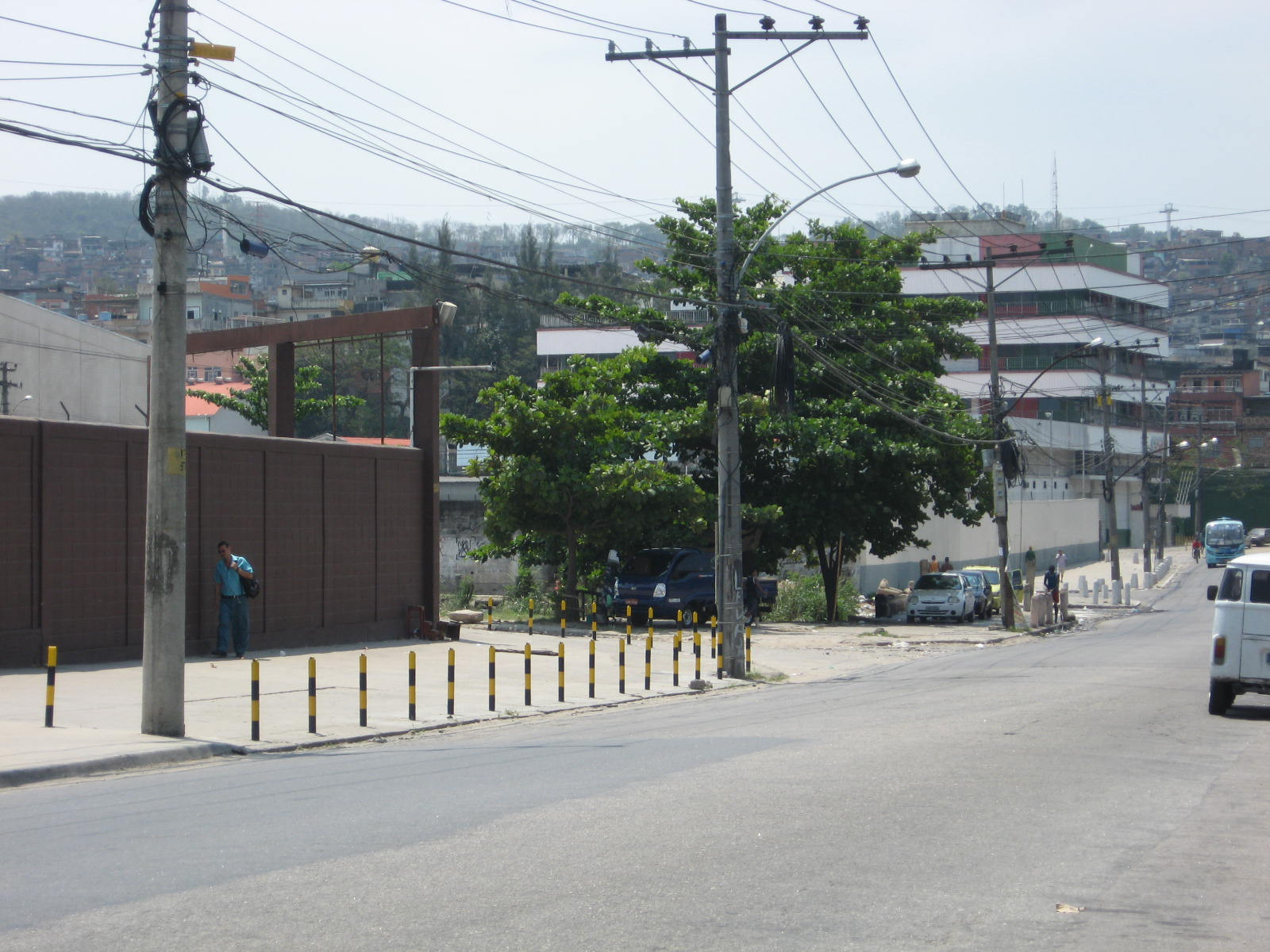 Vista do bairro carioca de Inhaúma.